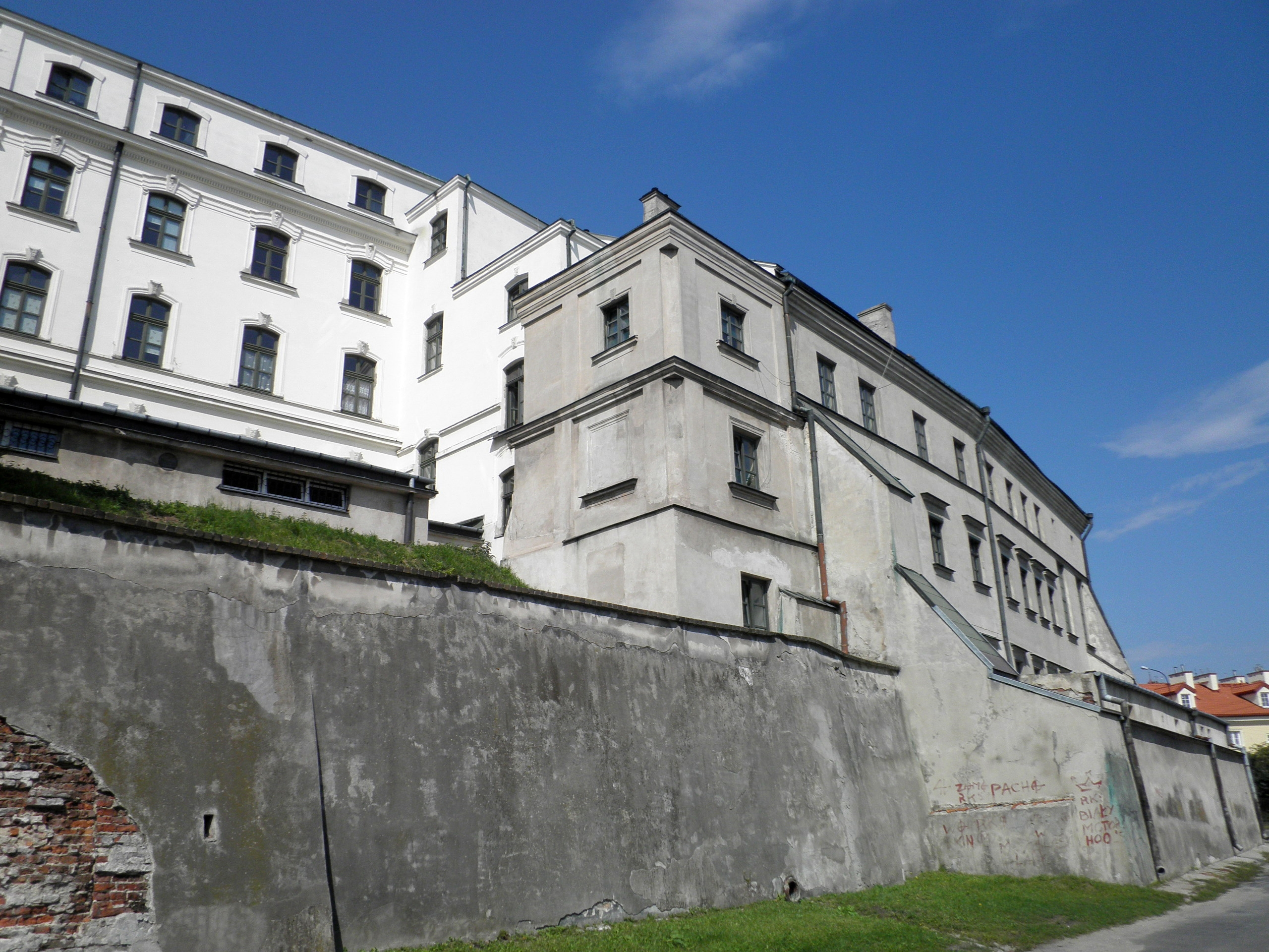 Budynek klasztoru po-misjonarskiego w Lublinie, obecnie seminarium duchowne - widok od ul. Misjonarskiej